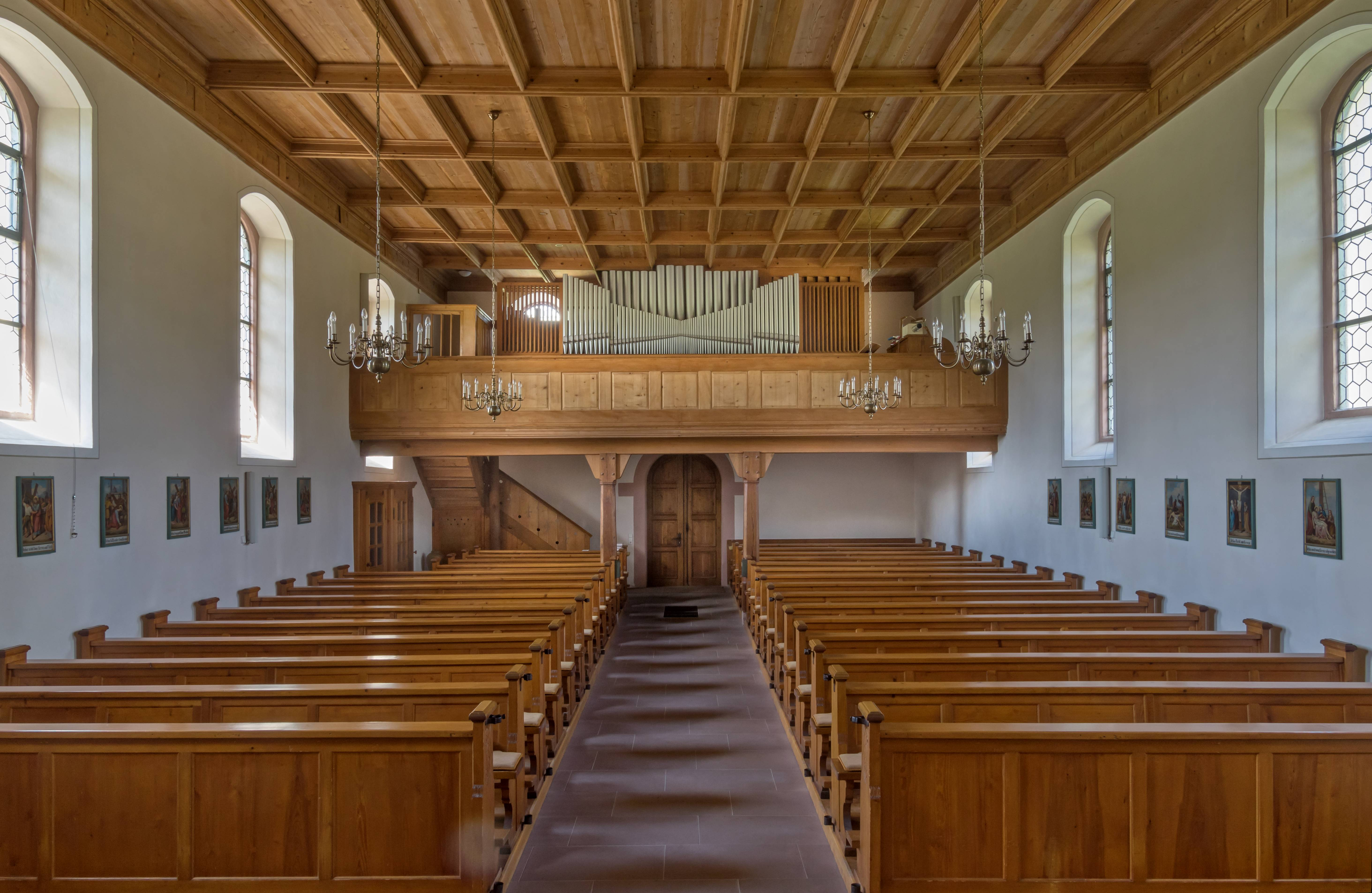 St. Andreas in Furtwangen Neukirch Blick zum Haupteingang